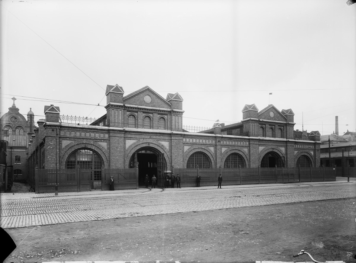 Spårvägshallarna